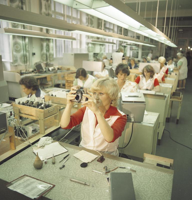 ADN-ZB Link 29.8.78 DDR: Kosmos - Sojus 31 Bei der Durchführung der Experimente "Biosphäre" und "Reporter" an Bord des Orbitalkomplexes Sojus 29 / Salut 6 / Sojus 31 werden die Kosmonauten Kameras aus der Serienproduktion des Kombinats VEB Pentacon Dresden benutzen, die vom Zentralinstitut für Physik der Erde der AdW modifiziert wurden. Die vollatomatische Spiegelreflexkleinbildkamera Practica EE2 mit elektronisch gesteuerter Belichtungsatomatik bei stufenloser Blendenvorwahl wird hier in der Serienfertigung am Montageband Funktionskontrollen unterzogen.